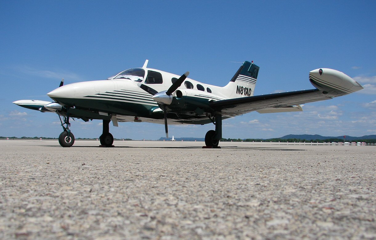 a nice little visitor to LSE